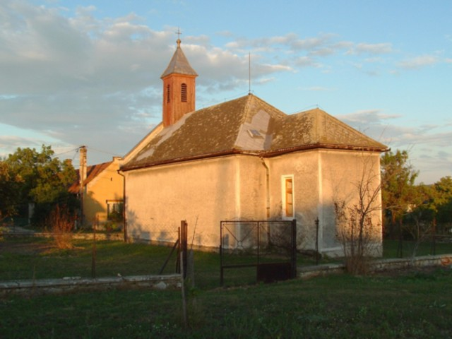 Katolikus kápolna, Sóly